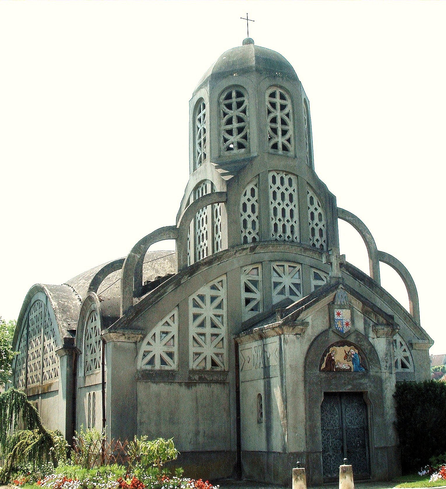 Clamecy - Eglise Notre-Dame-de-Bethleem